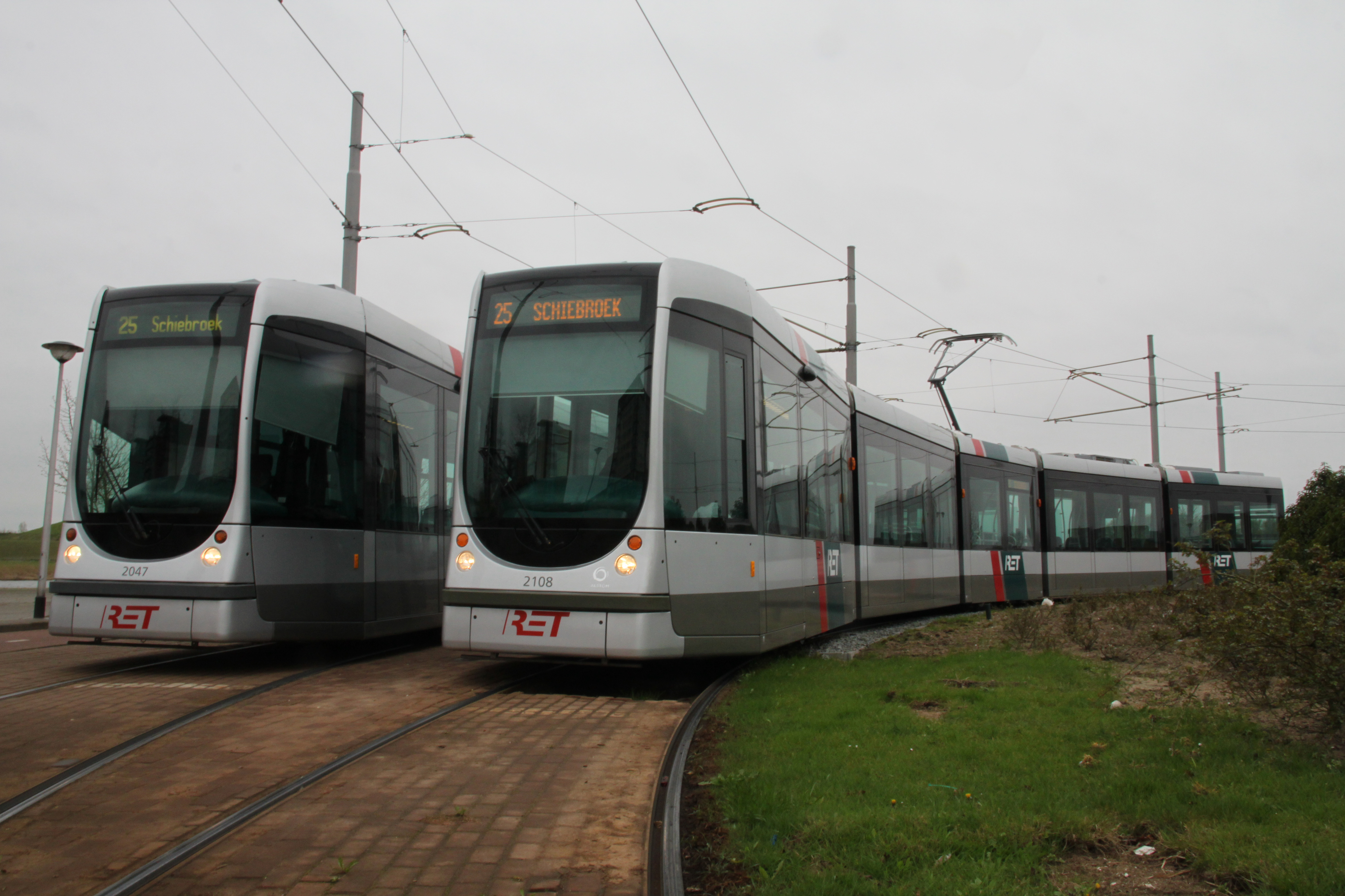 Foto van een Citadis in Rotterdam uit de 2100-serie.